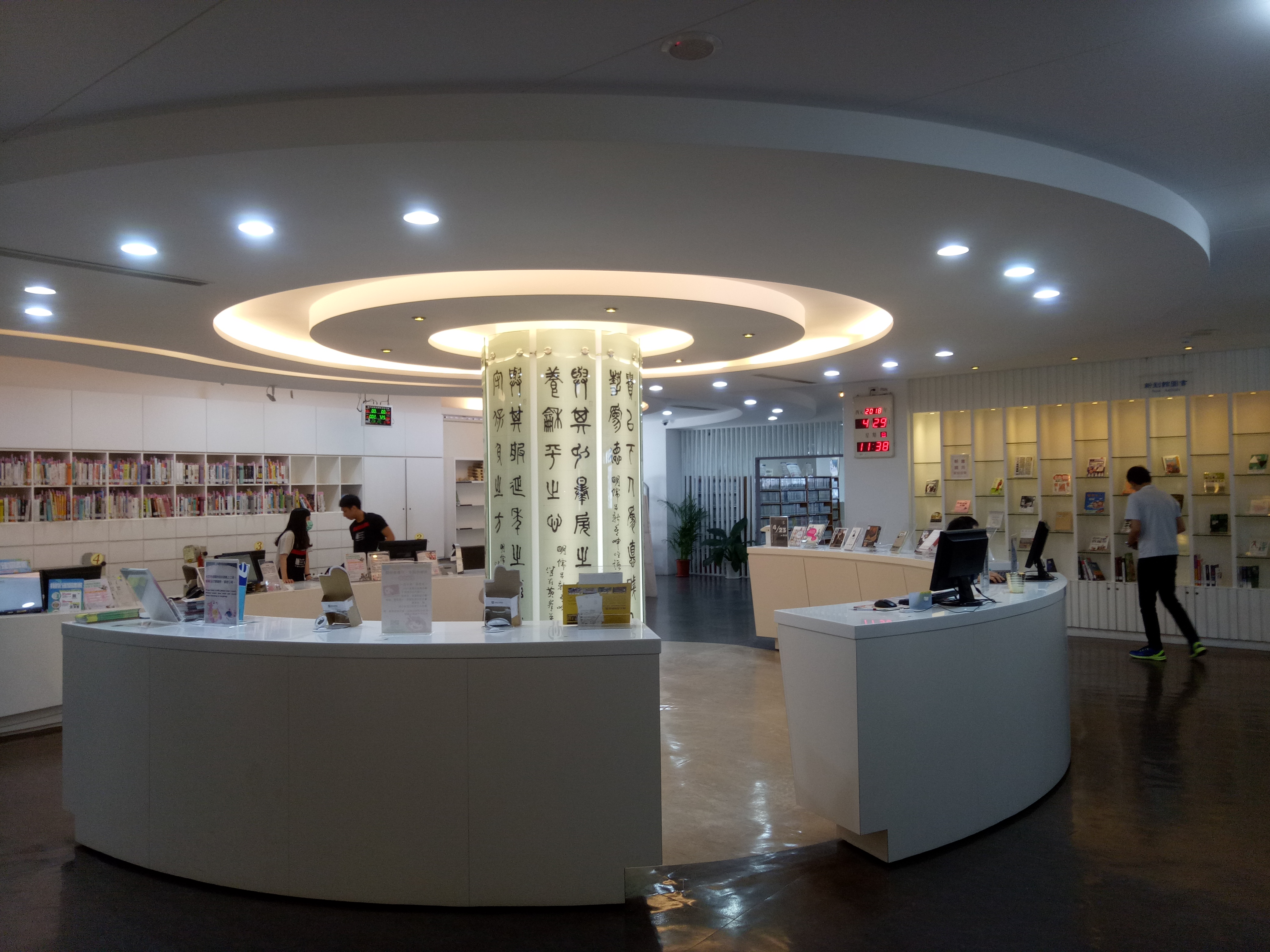 桃園市立圖書館文化局總館。(內部書庫區）